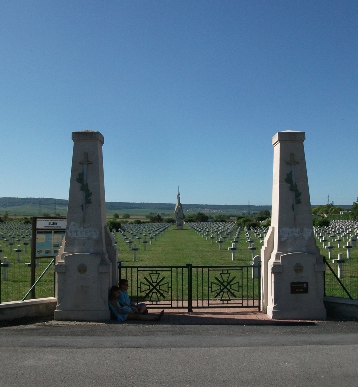 Entrée de la Nécropole nationale de Sillery, vue vers le sud.